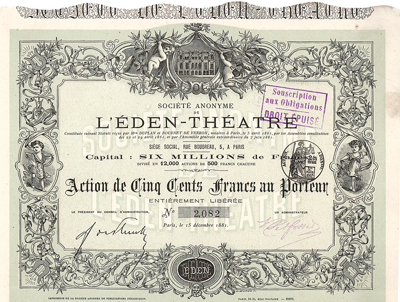 Aktie über 500 Francs der S.A. de l'Eden-Theatre vom 15. Dezember 1881